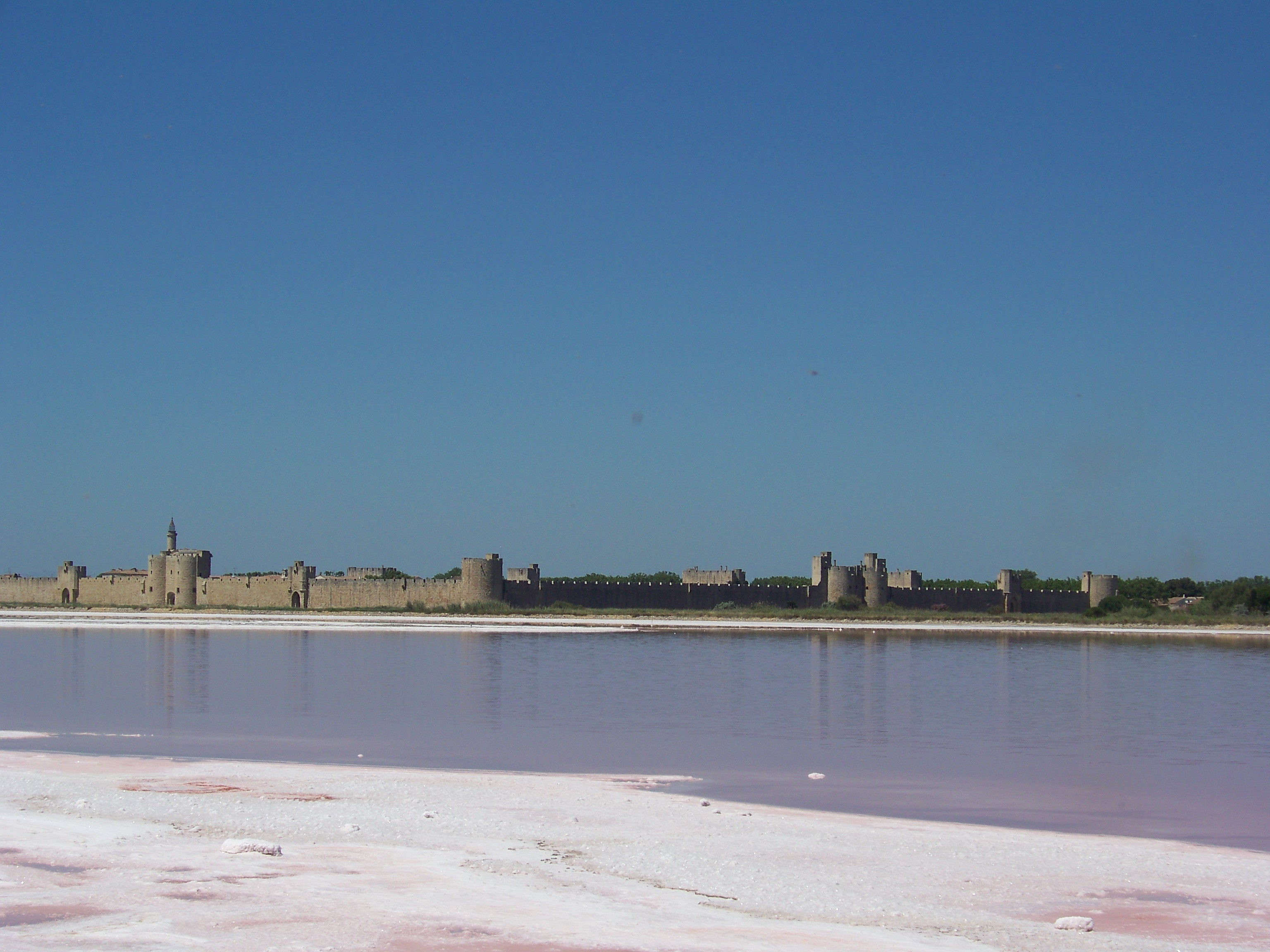 Vue de la ville depuis les salins